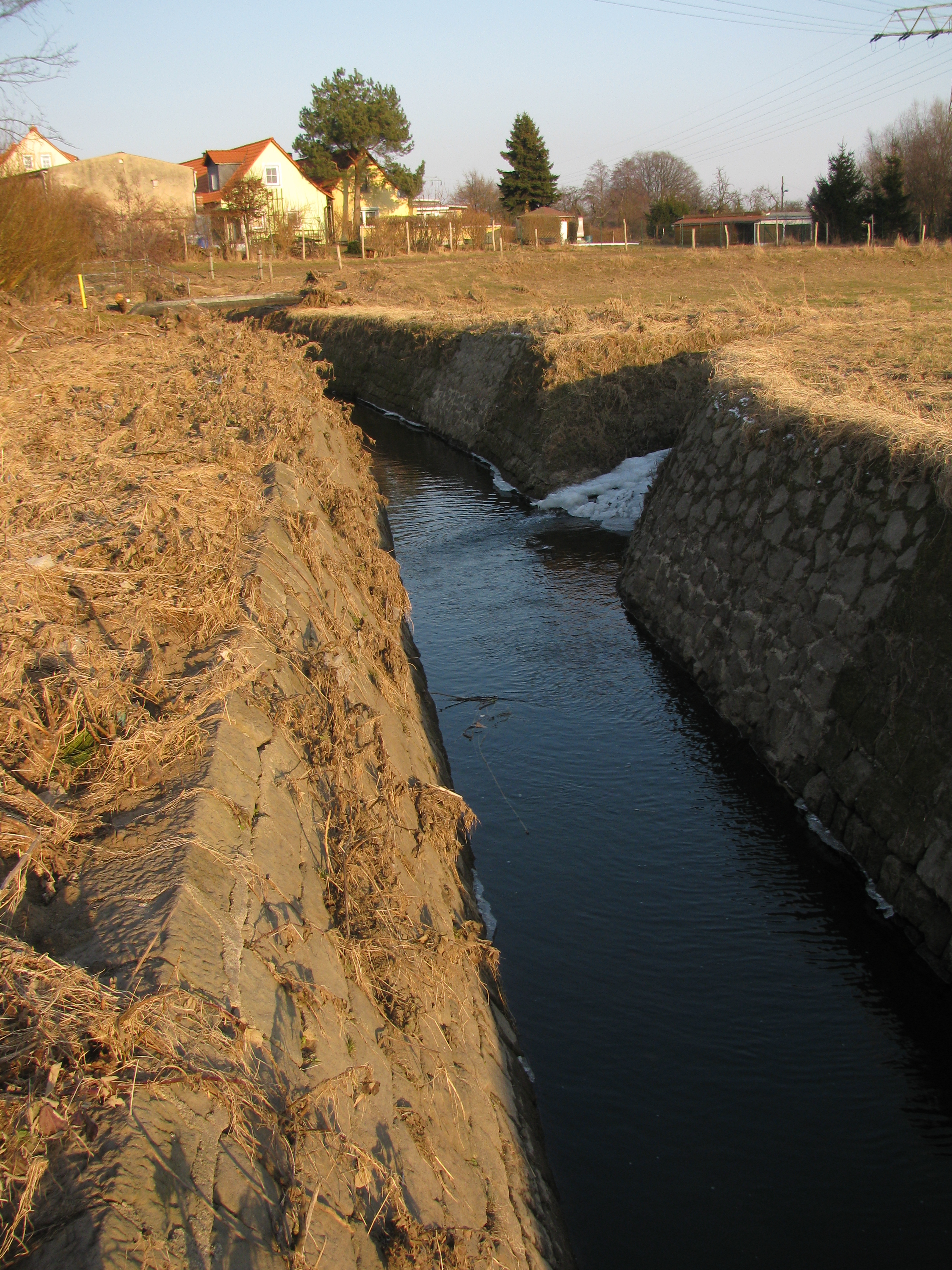 Seegraben (rechts) mündet in den Lößnitzbach (links), Radebeul